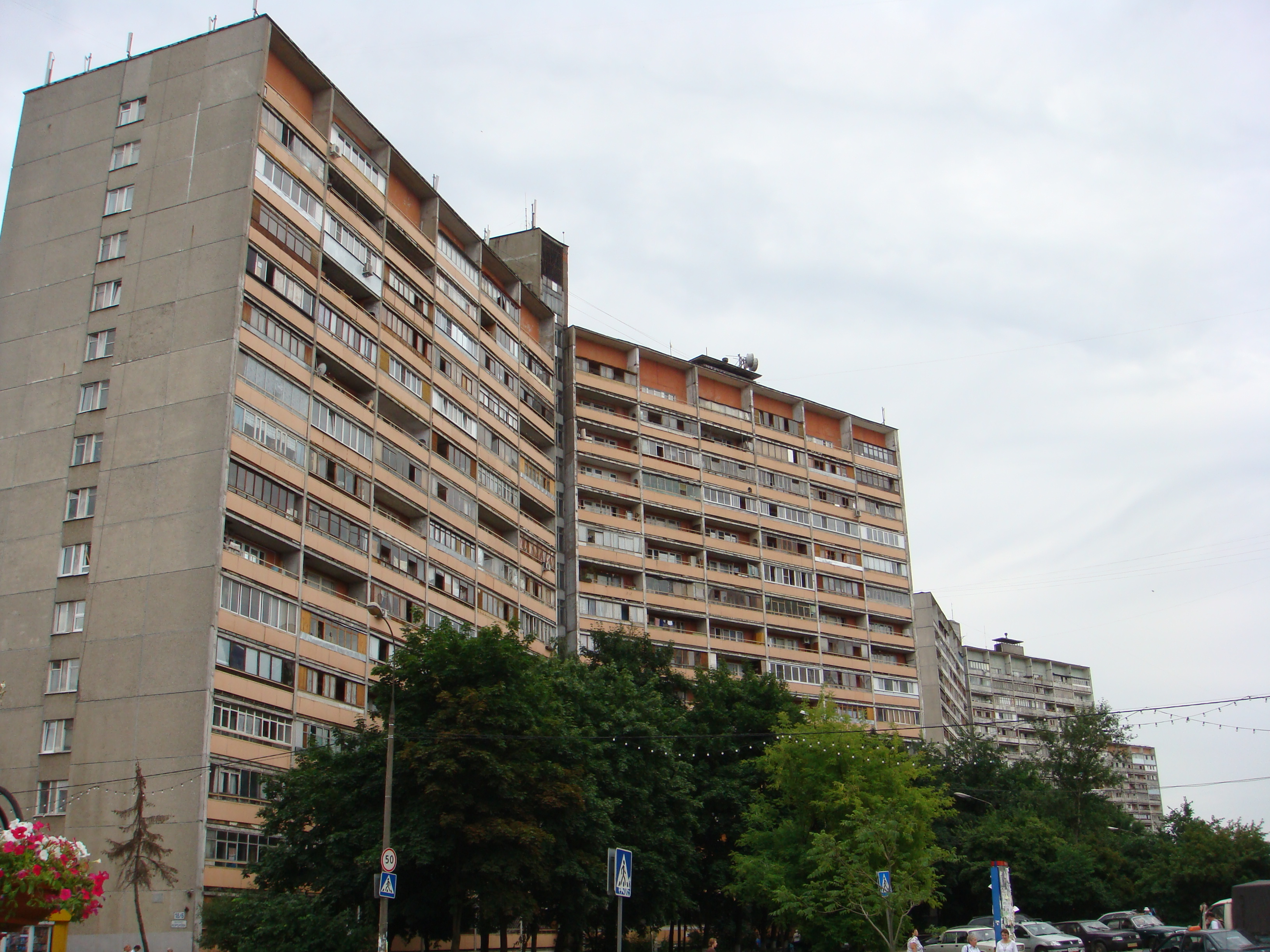 Первые три "книжки" домов МЖК в СССР (г. Калининград (Королёв))